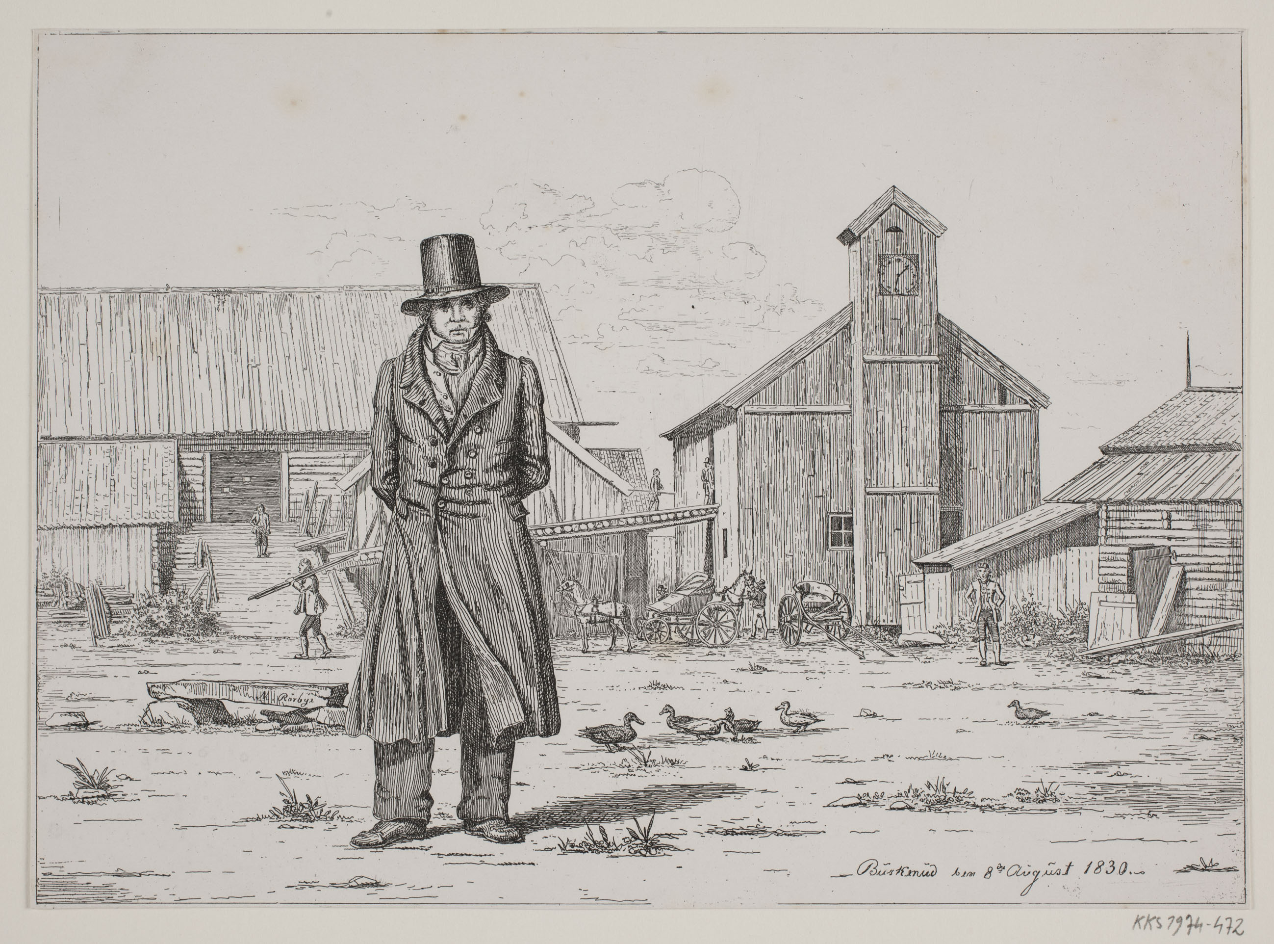 Peter Collett (8.8.1766-27.7.1836) dansk assessor og godsejer